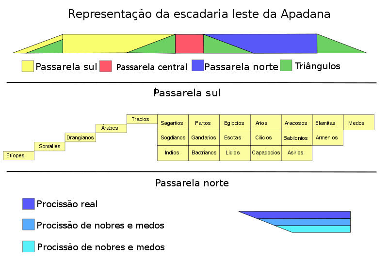 Sheme of the Eastern Stairway, Apadana palace, Persepolis Iran. portuguese legend